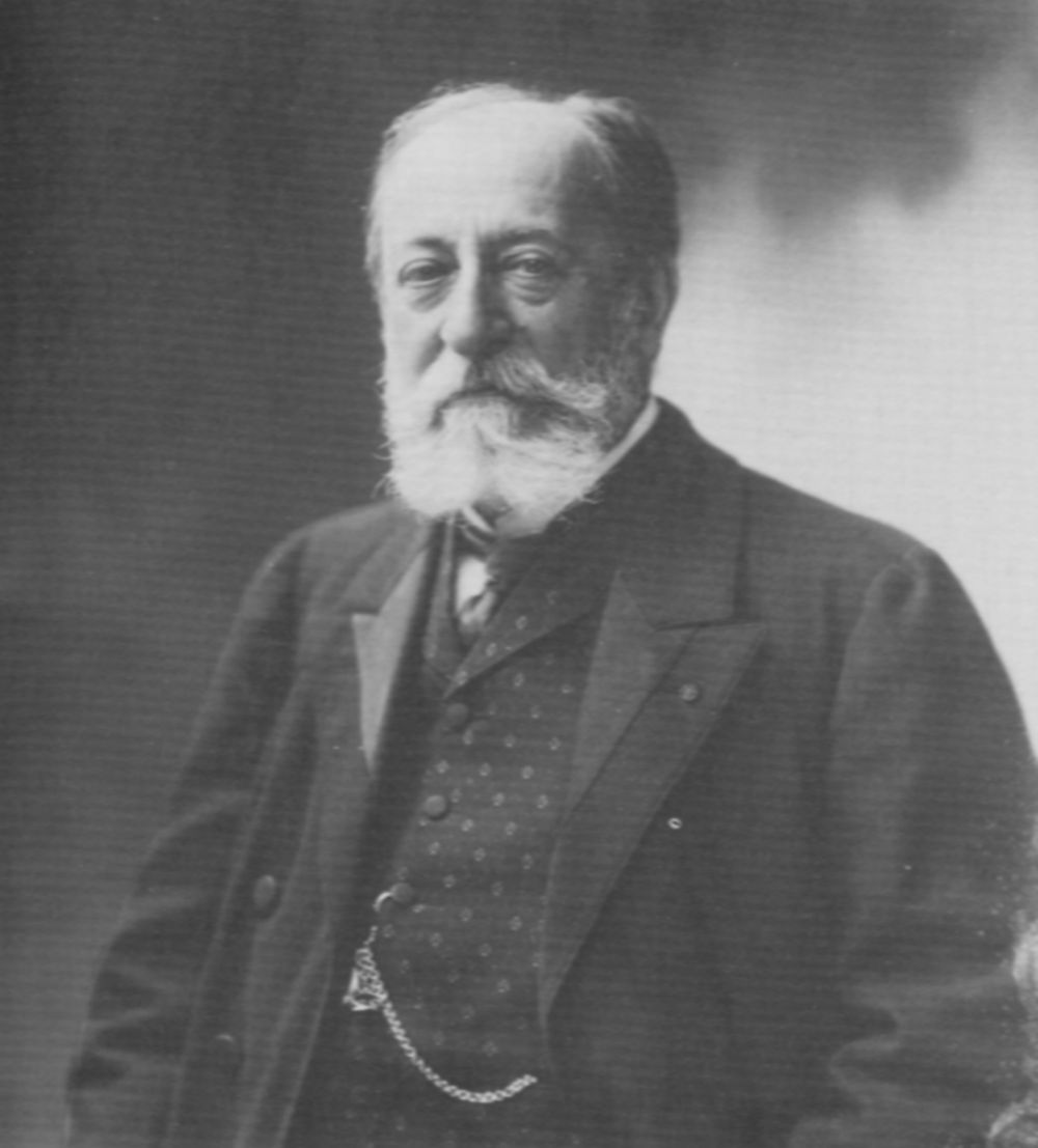 Atelier Nadar: Camille Saint-Saëns (1835-1921), Komponist